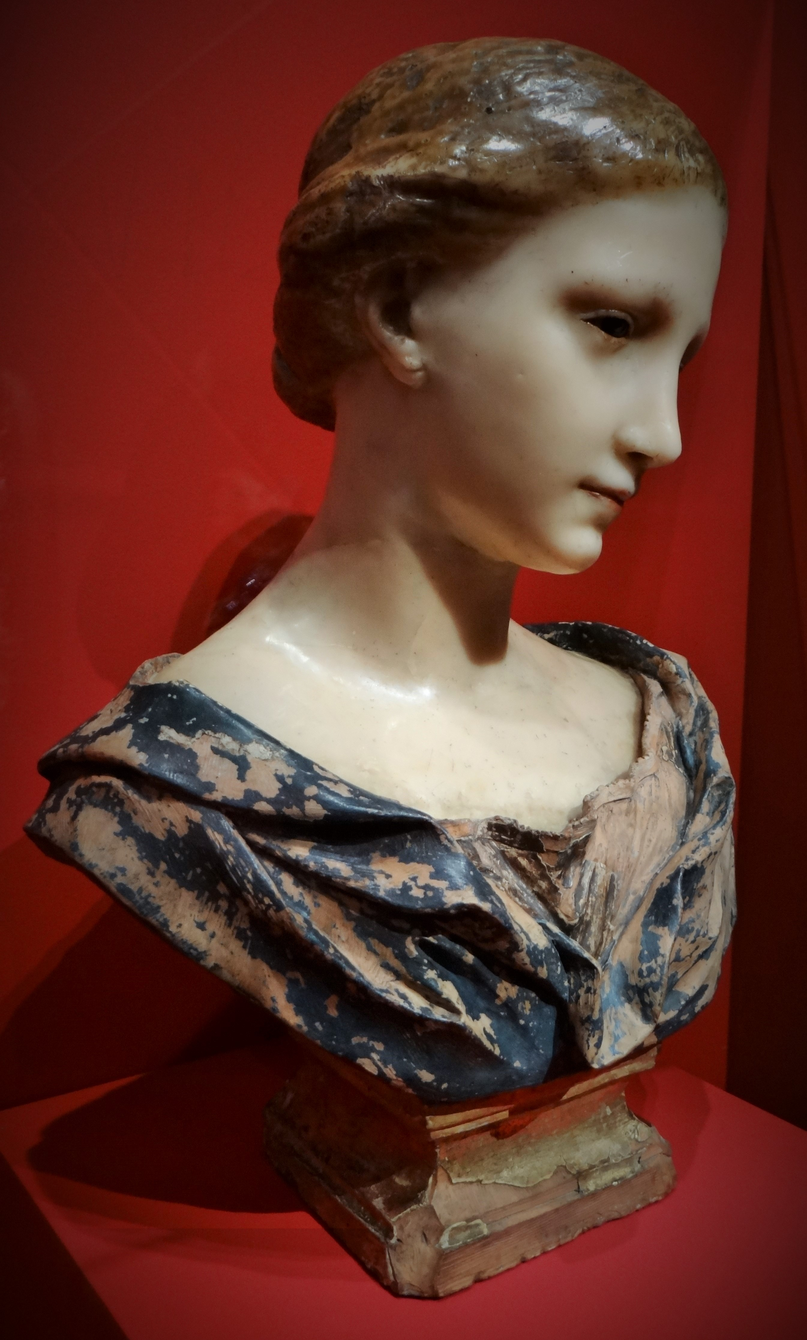 Tête de cire, dite Tête de Wicar, XVIIe s, cire peinte, terre cuite peinte et verre soufflé, Anonyme, Italie